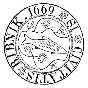 Pieczęć miasta Rybnika z 1669 roku.